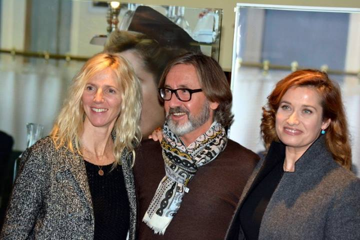 Sandrine Kiberlain, Martin Provost et Emmanuelle Devos à l'avant-première du film "Violette".